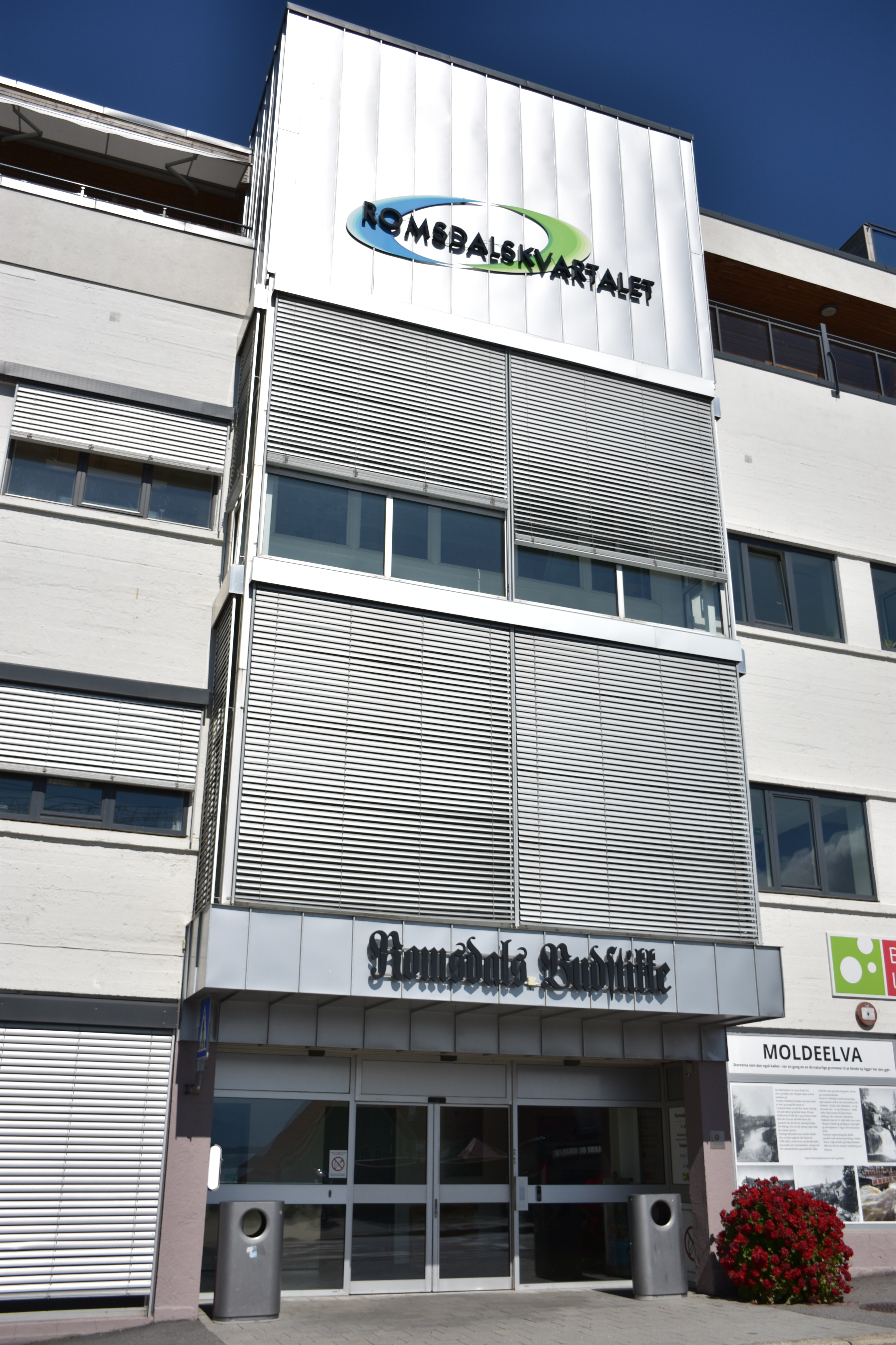 Romsdals Budstikkes lokaler i Molde